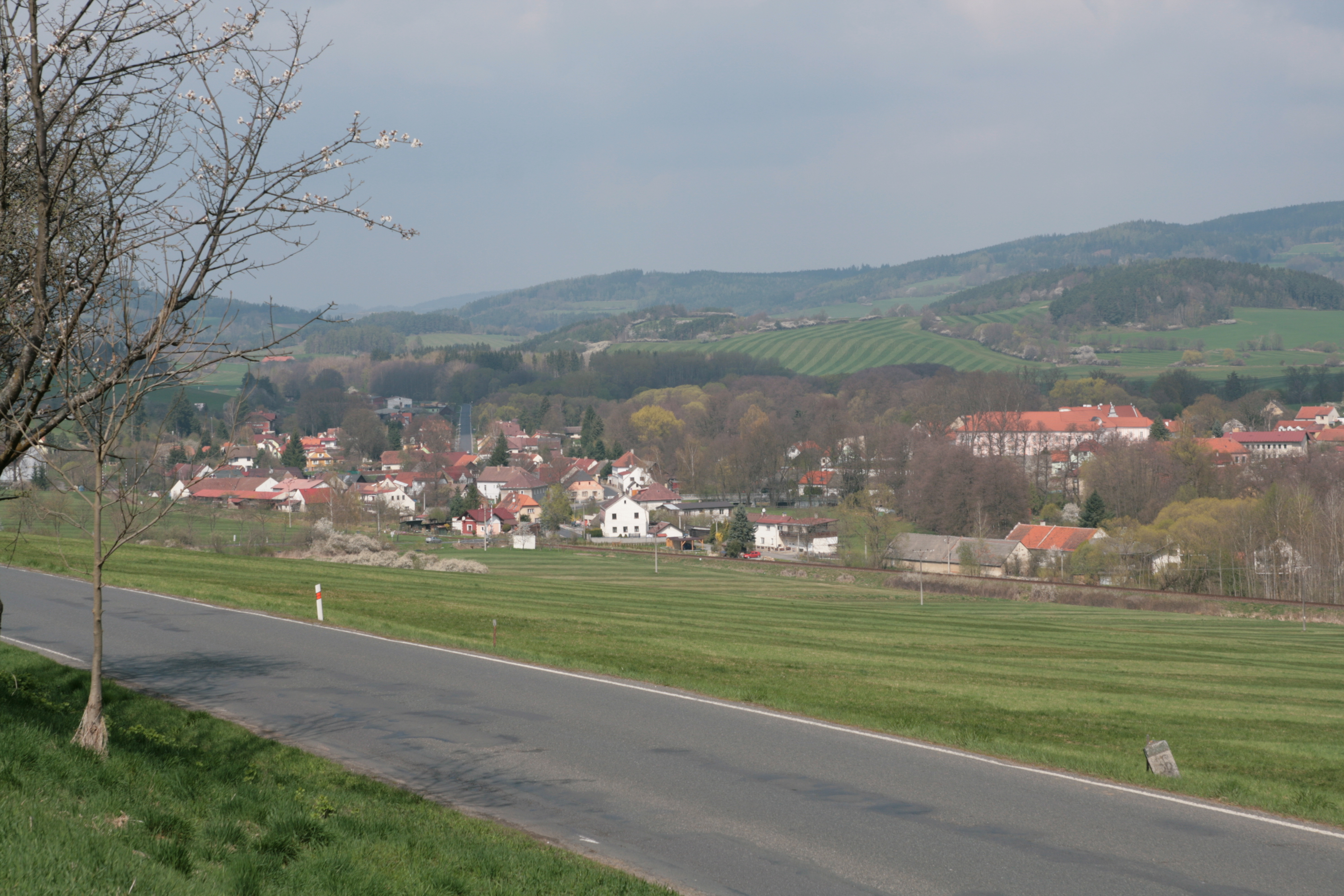 Obec Hrádek v okrese Klatovy v Plzeňském kraji. Celkový pohled z jihovýchodu od silnice na Sušici.